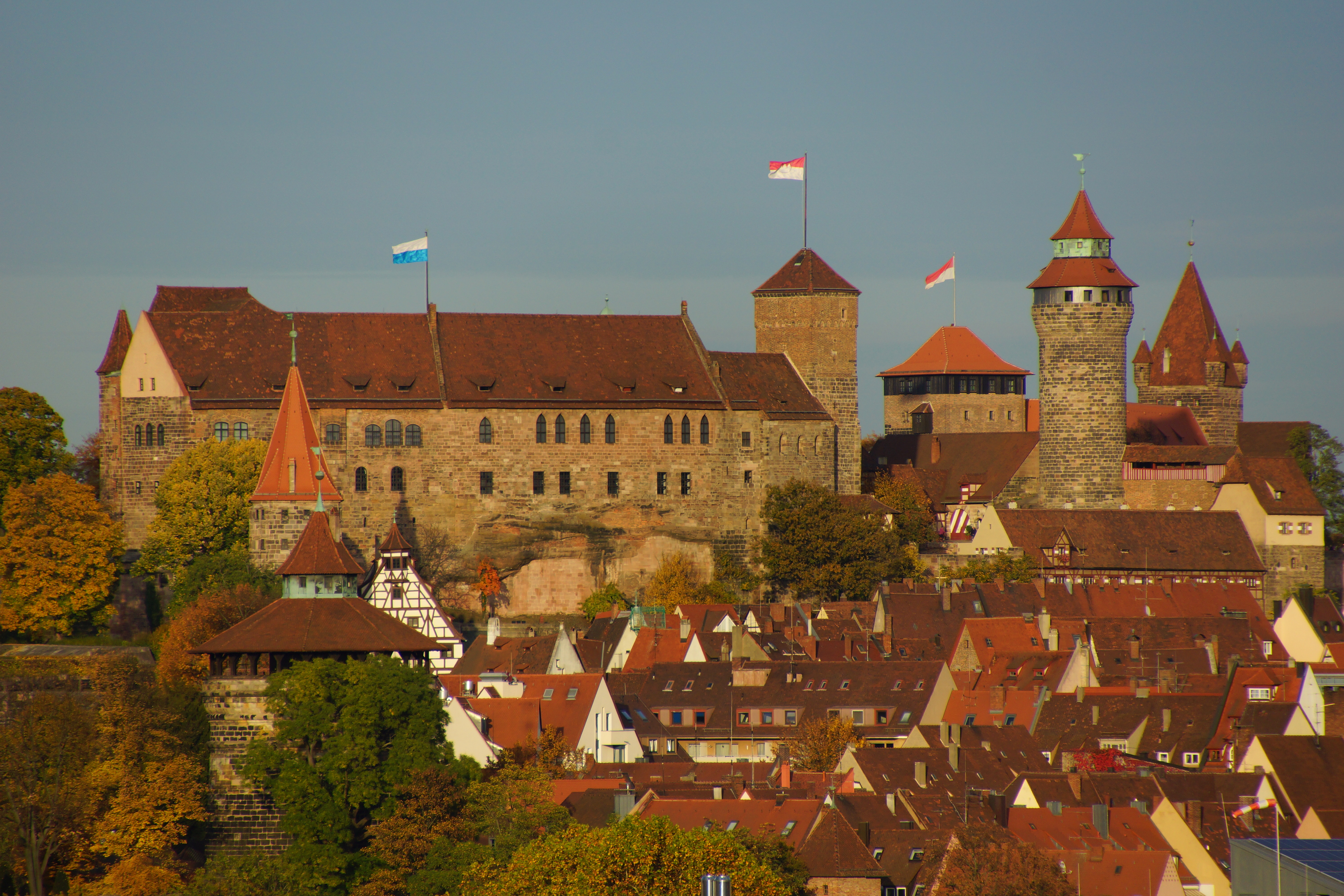 Blick auf die Nürnberger Burg von Südwesten, Herbst 2013